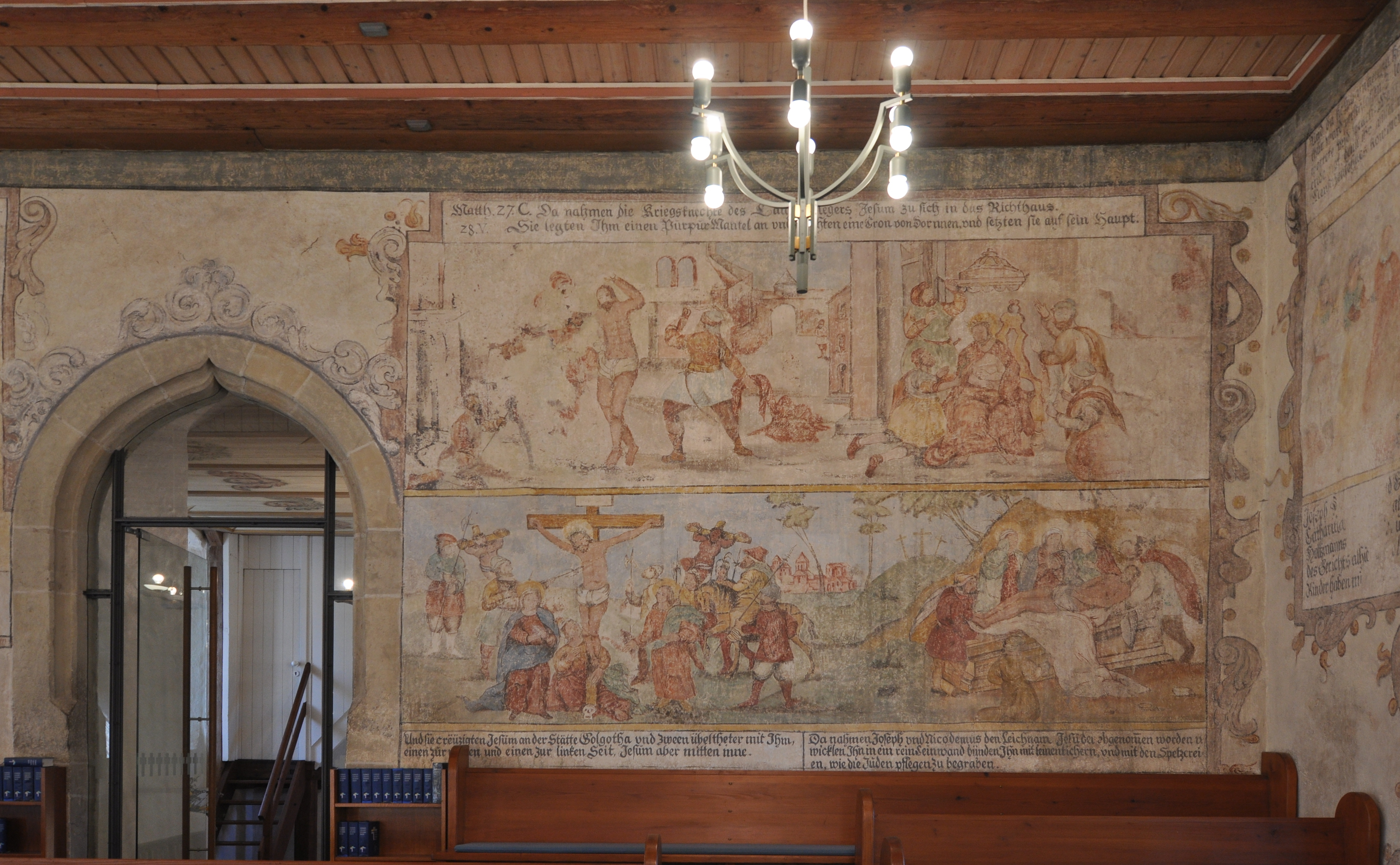 Kilianskirche in Bissingen an der Enz, Passionsdarstellung an der Wand oberhalb der Empore, vermutlich 1691